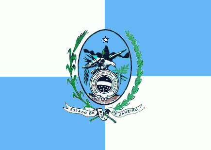 Modelo proposto pela fonte: [1], e pelo que consta aqui: [2] como bandeira oficial que representava o estado, até sua regulamentação pela Lei estadual nº 5.588.